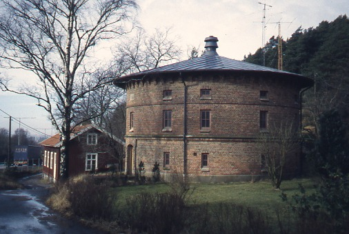 Vattentornet från 1881 i stadsdelen Kallebäck i Göteborg